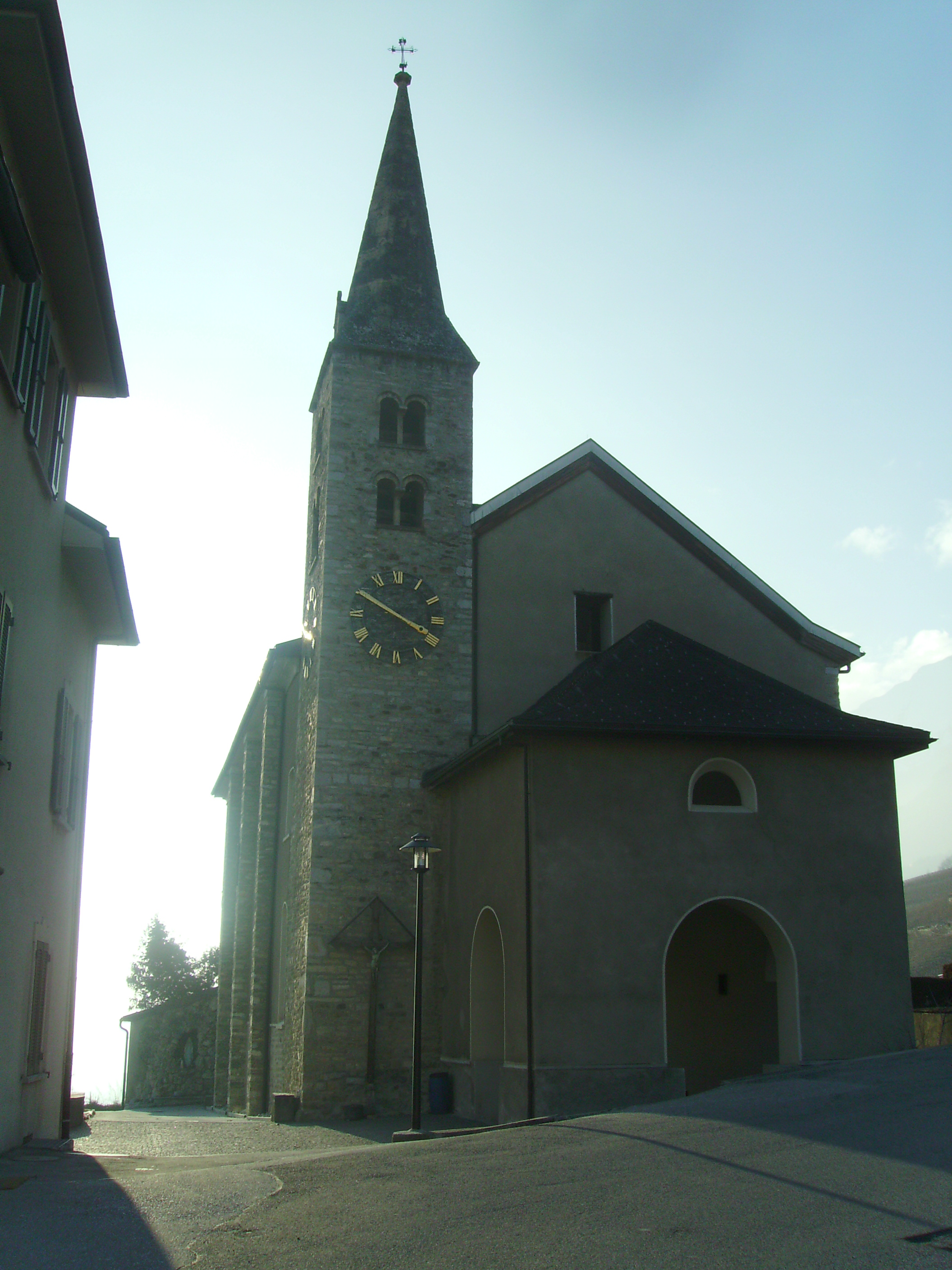 St-Séverin